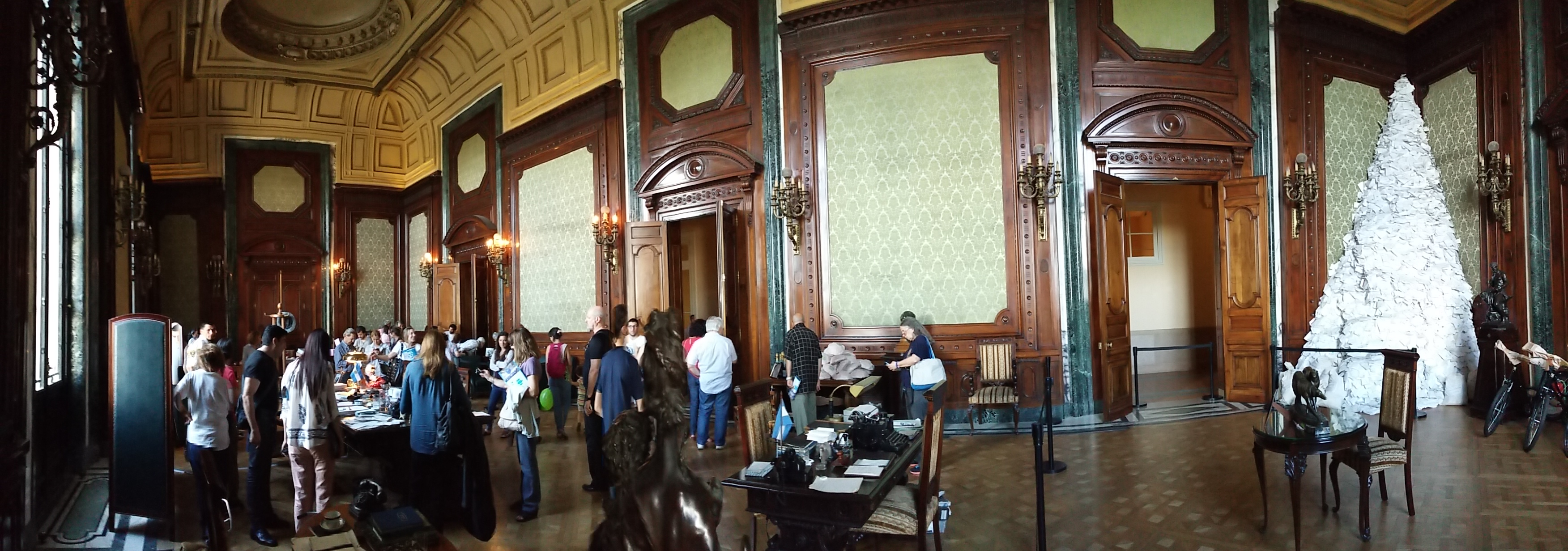 Oficina donde funcionó la Fundación Eva Perón en el Correo Argentino (actual Centro Cultural Néstor Kirchner). (Visión panorámica)